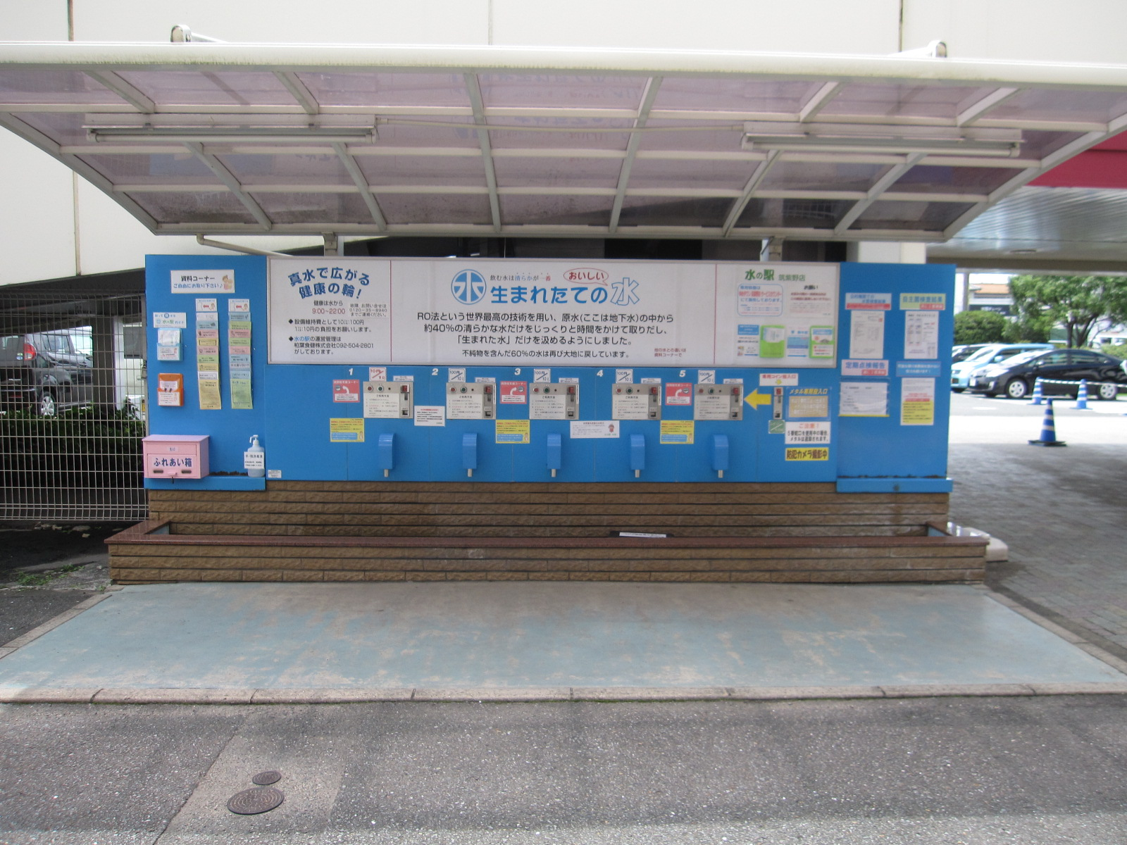 ゆめタウン筑紫野にある水の駅筑紫野店